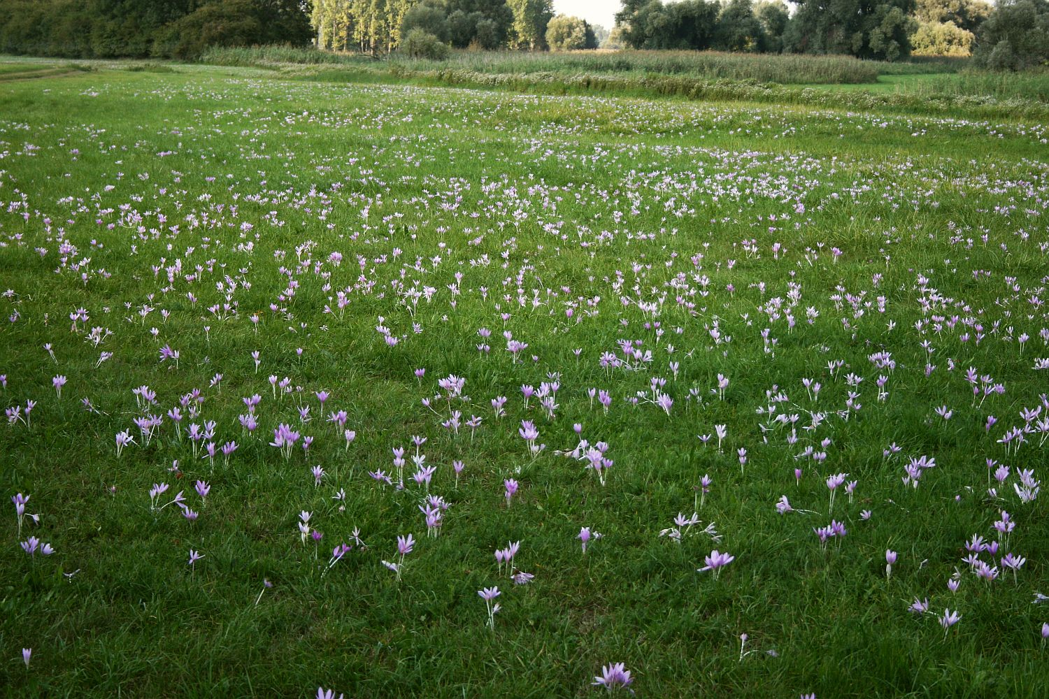 Herbstzeitlose (Colchicum autumnale), Zeitlosengewächse (Colchicaceae) – Österreich/Austria/Autriche: Niederösterreich, Marchfeld, „Lange Lüsse“ bei Schloßhof